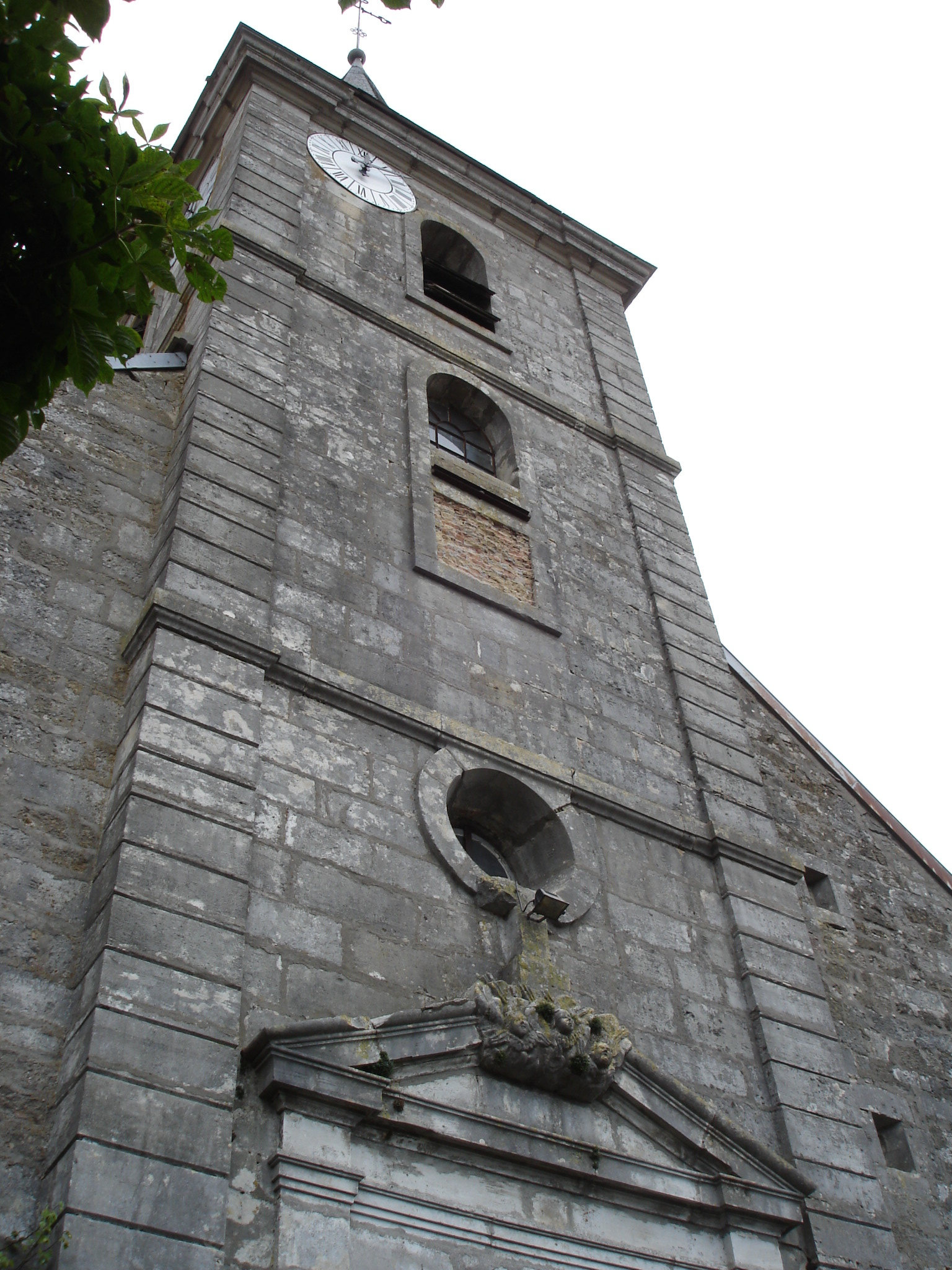 façade et clocher de l'église